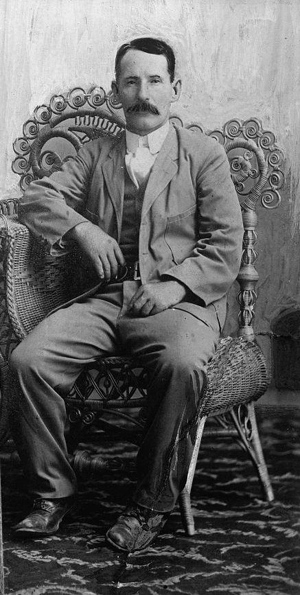 General Mariano Arrieta